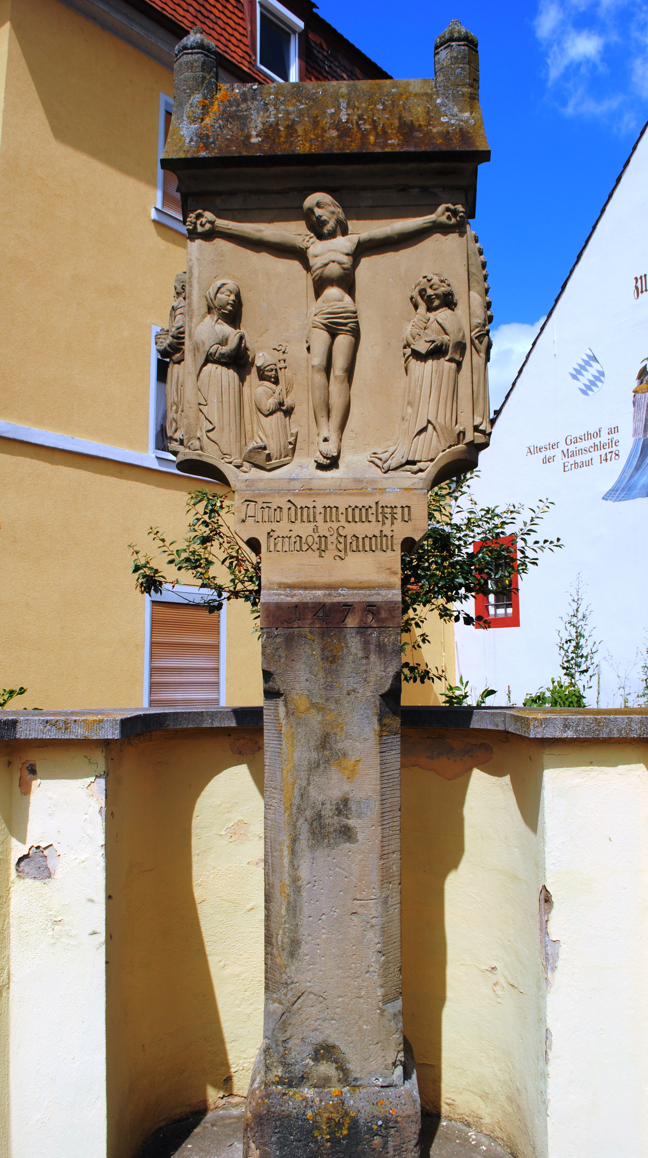 Bildstock, Münsterschwarzach, Kreuzigung